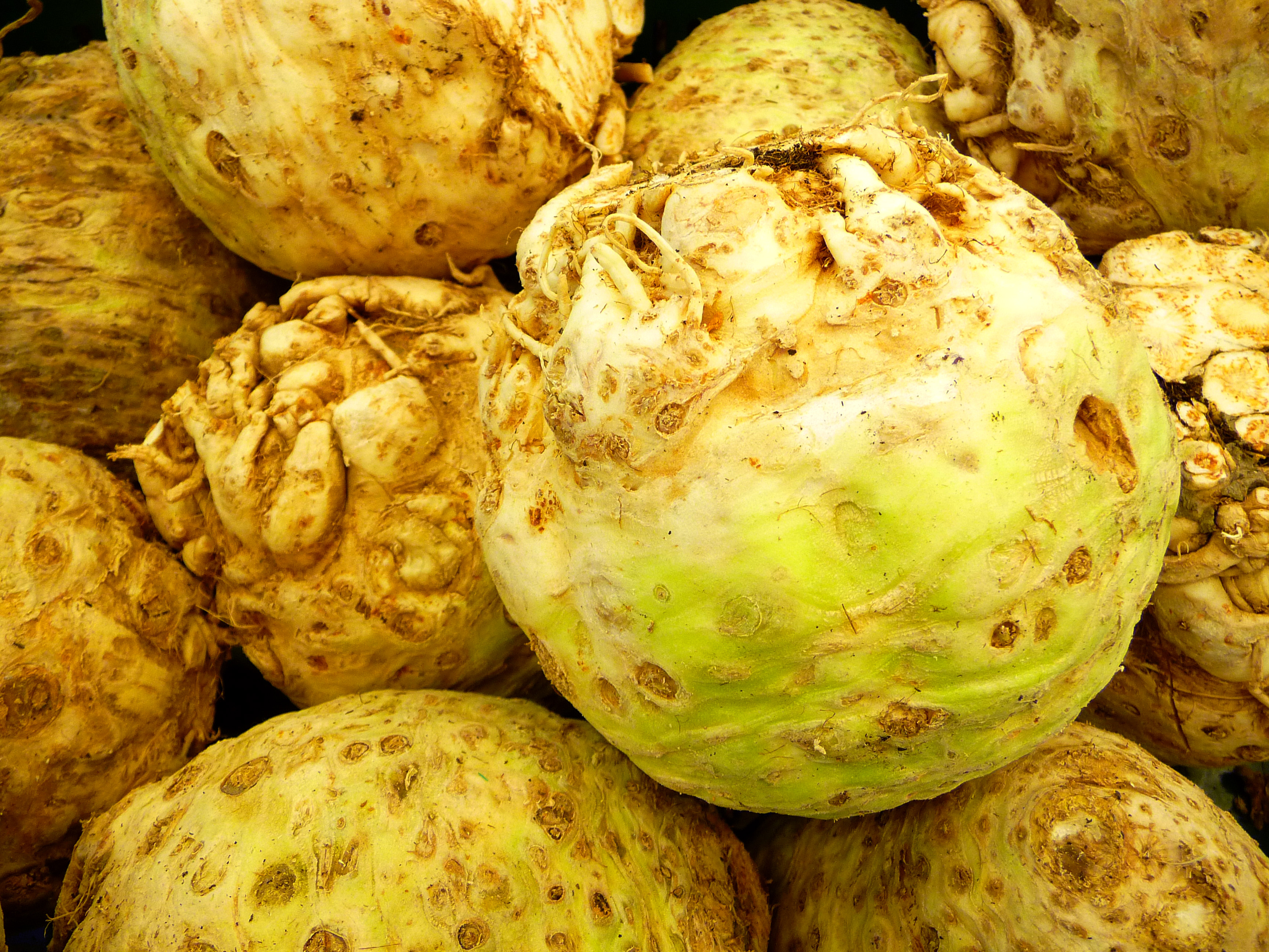 Knollensellerie (Apium graveolens var. rapaceum)